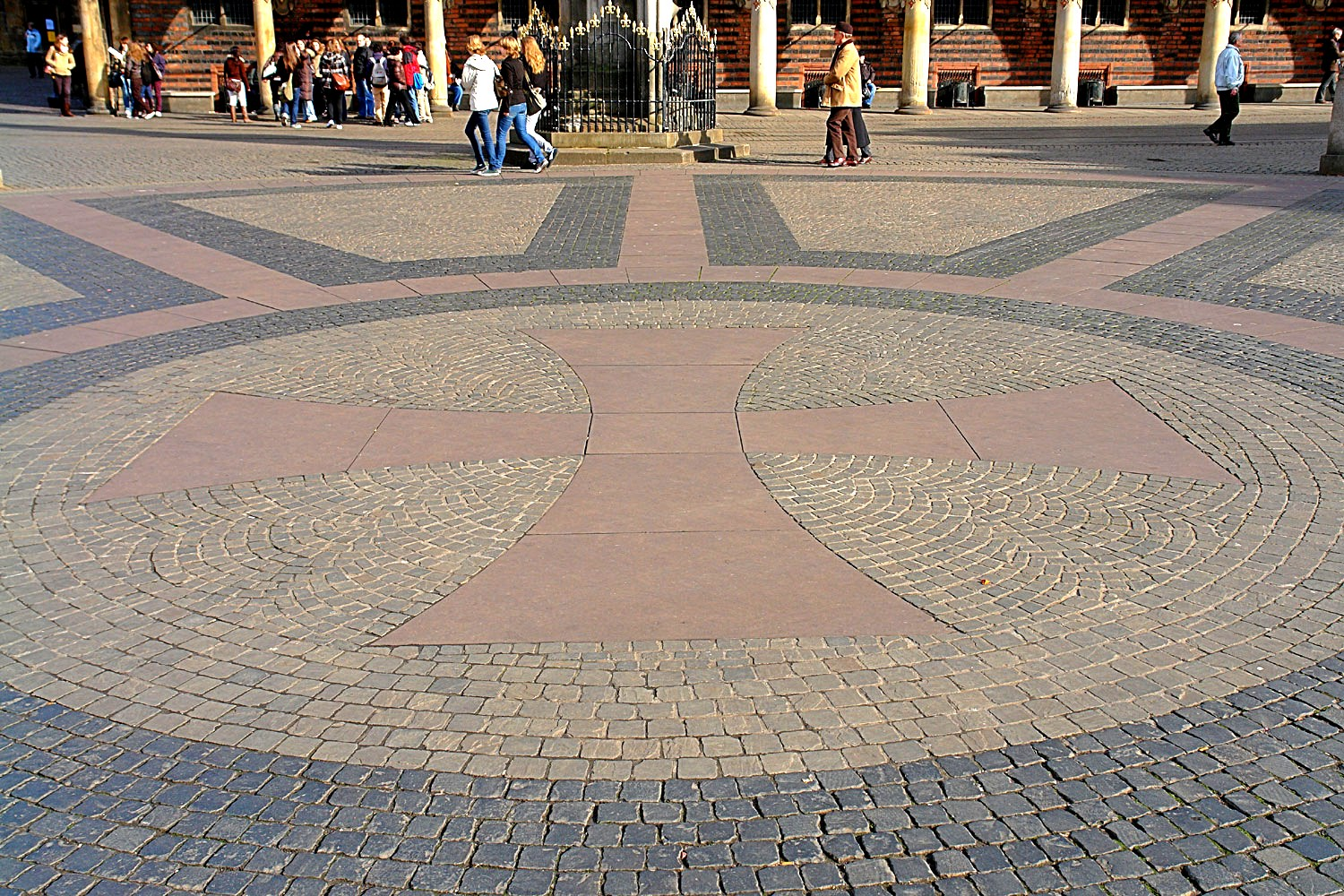 Bremer Marktplatz: Hanseatenkreuz vor dem Roland. Durchmesser ca. 5 m, Pflasterkreis-Durchmesser ca. 30 m